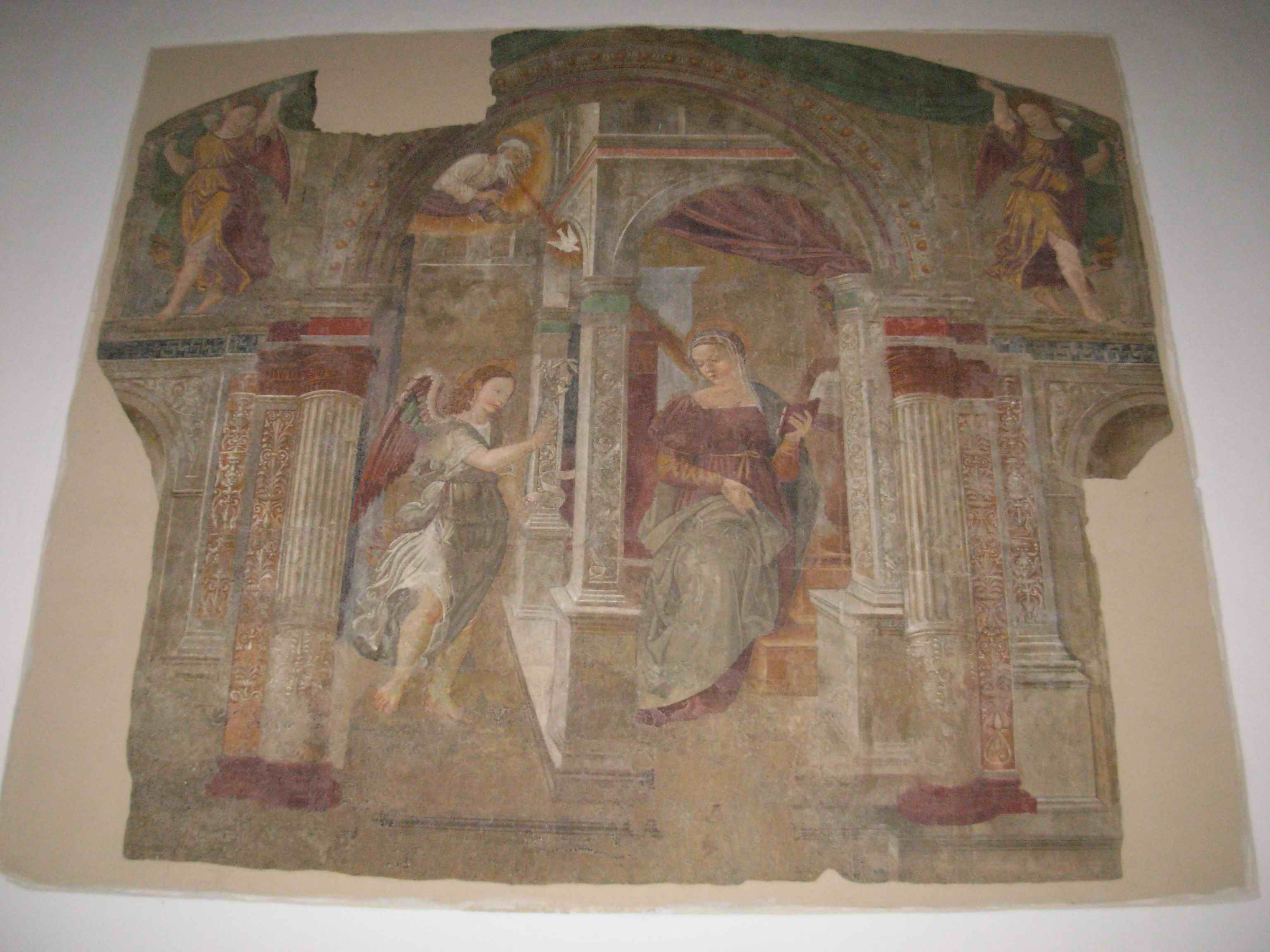 Giovanni Maria Tolosani, Annunciazione, nella Chiesa di San Niccolò a Roccastrada (GR, Italia)